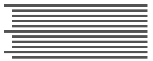 Отбивка абзацев втянутым отступом в первой строке